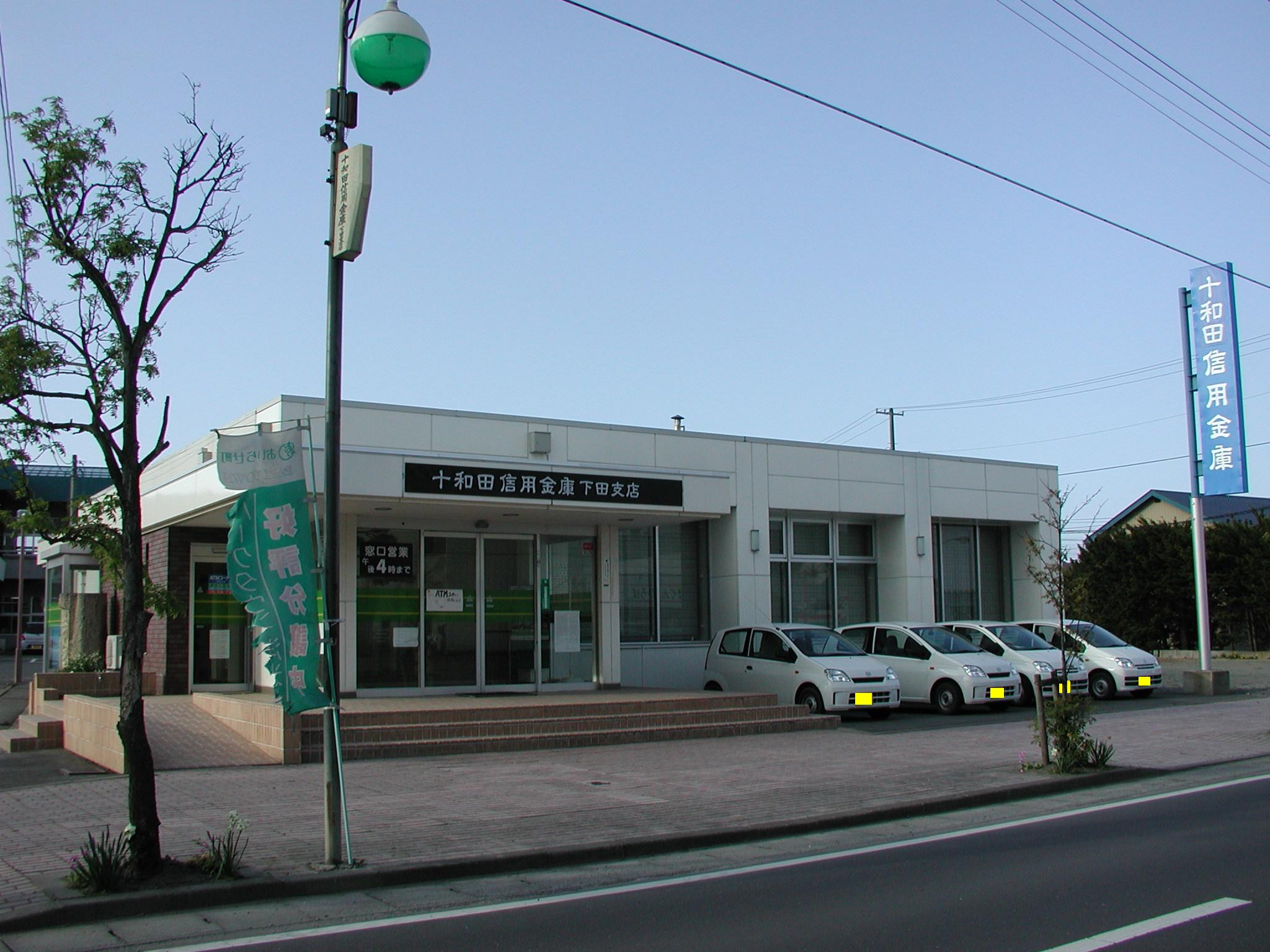 十和田信用金庫 下田支店（店番：023） （現：八戸信用金庫 おいらせ支店/店番：038） ※：自動車ナンバー部分隠し加工処理済み 八戸信用金庫との合併を前に、看板サインの変更が行われた。書体は八戸信金のものに合わせられ、「八戸」の部分には「十和田」の文字で隠すように被せられている。